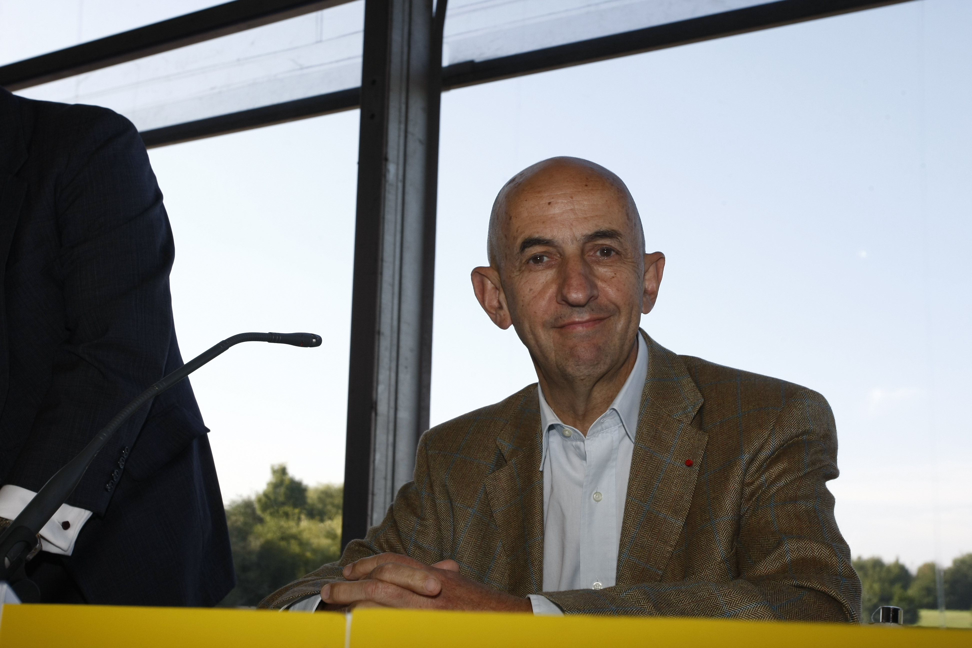 Louis Gallois à la conférence-débat "USA: still a giant..." à l'Université d'été 2008 du MEDEF